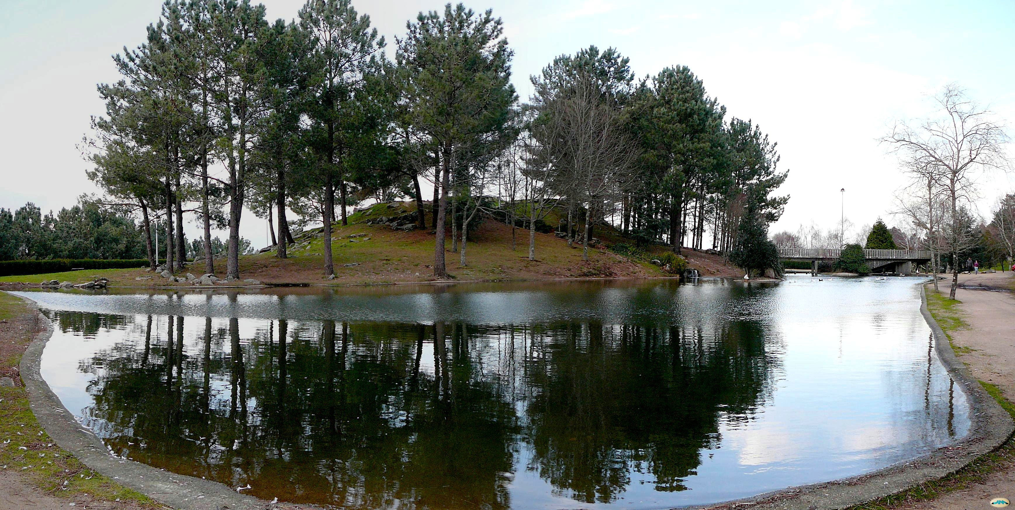 Después de ocho días sin aparecer por Flickr, me encuentro como si hubiera hecho una cura mental...No dejé la cámara, aunque sí he seguido compartiendo imágenes en vivo y en directo, una experiencia enriquecedora...Vuelvo, casi como nuevo, aunque con os mismos ánimos y la misma ilusión que siempre por subir fotos y admirar las de todos vosotros... Un cordial saludo